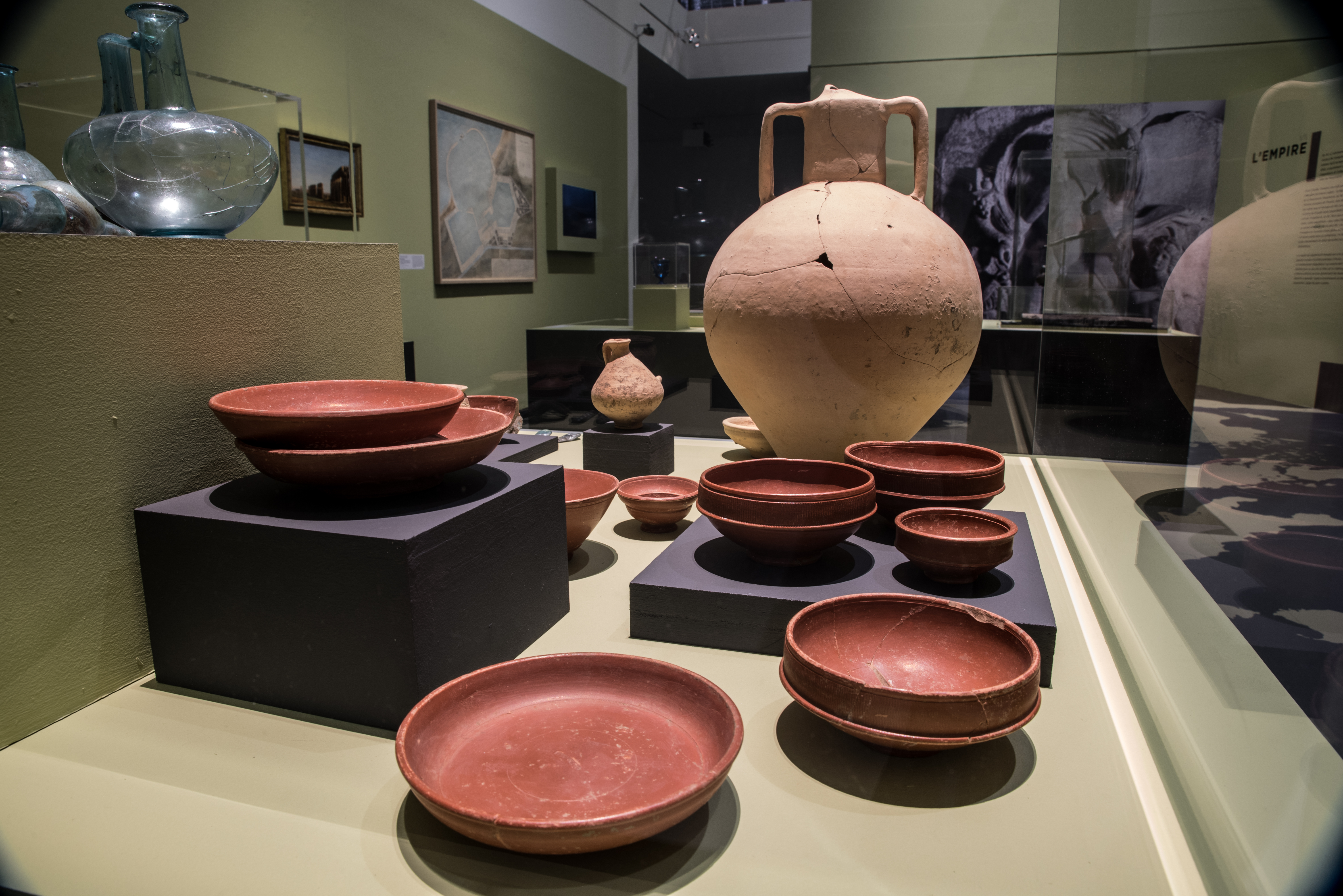 Claude, un empereur au destin singulier - Exposition au musée des Beaux-Arts de Lyon - 2018. Objets provenant d'une tombe à incineration dans la nécropole du Valladas à Saint-Paul-Trois-Chateaux - Prêt du musée d'archéologie tricastine